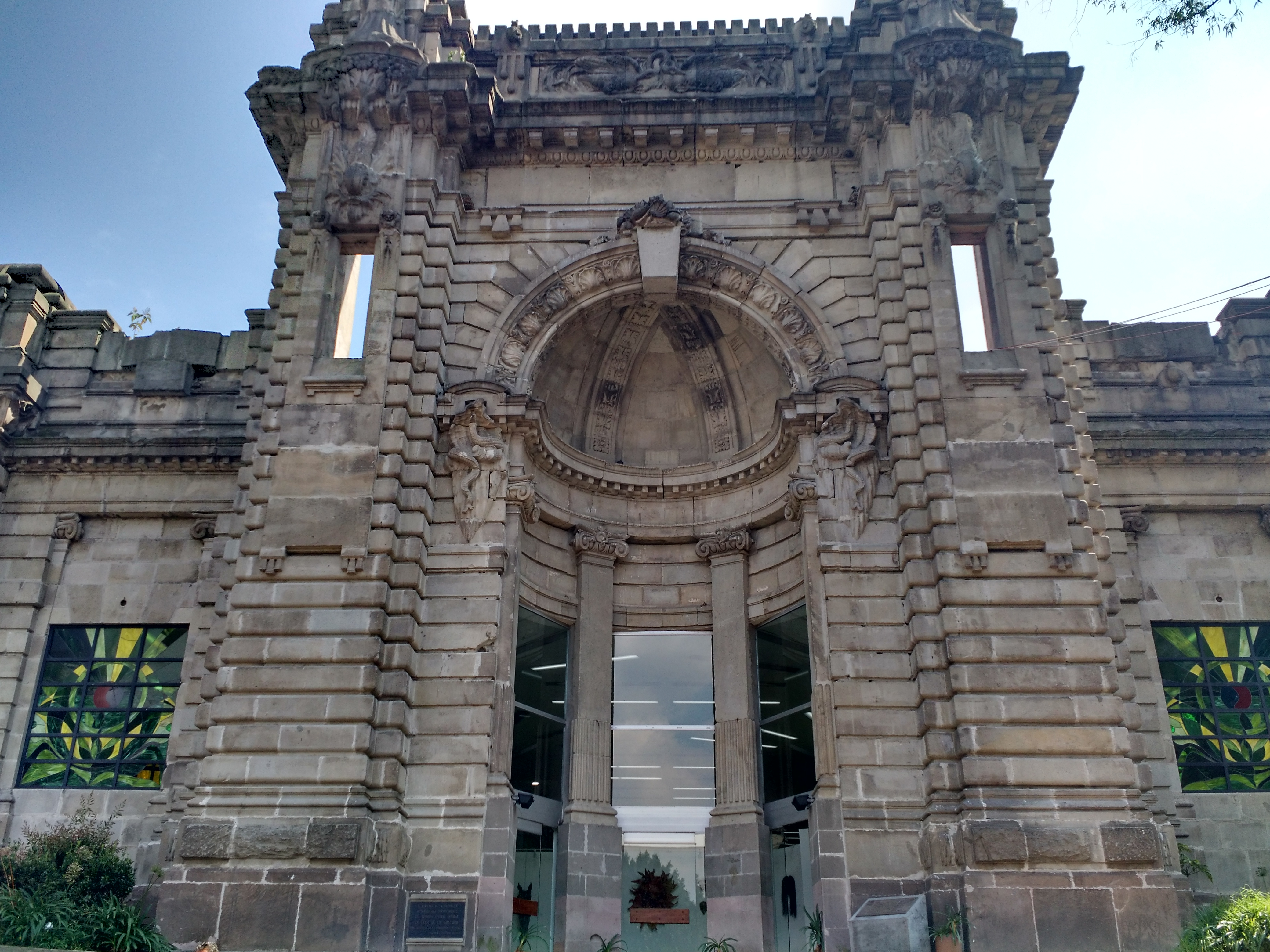 Vista de la fachada de la Casa de la Cultura Tlalpan. Tlalpan, Ciudad de México.